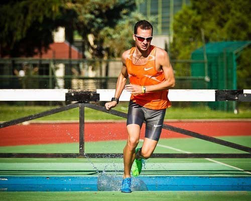 Minczér Albert magyar középtávfutó